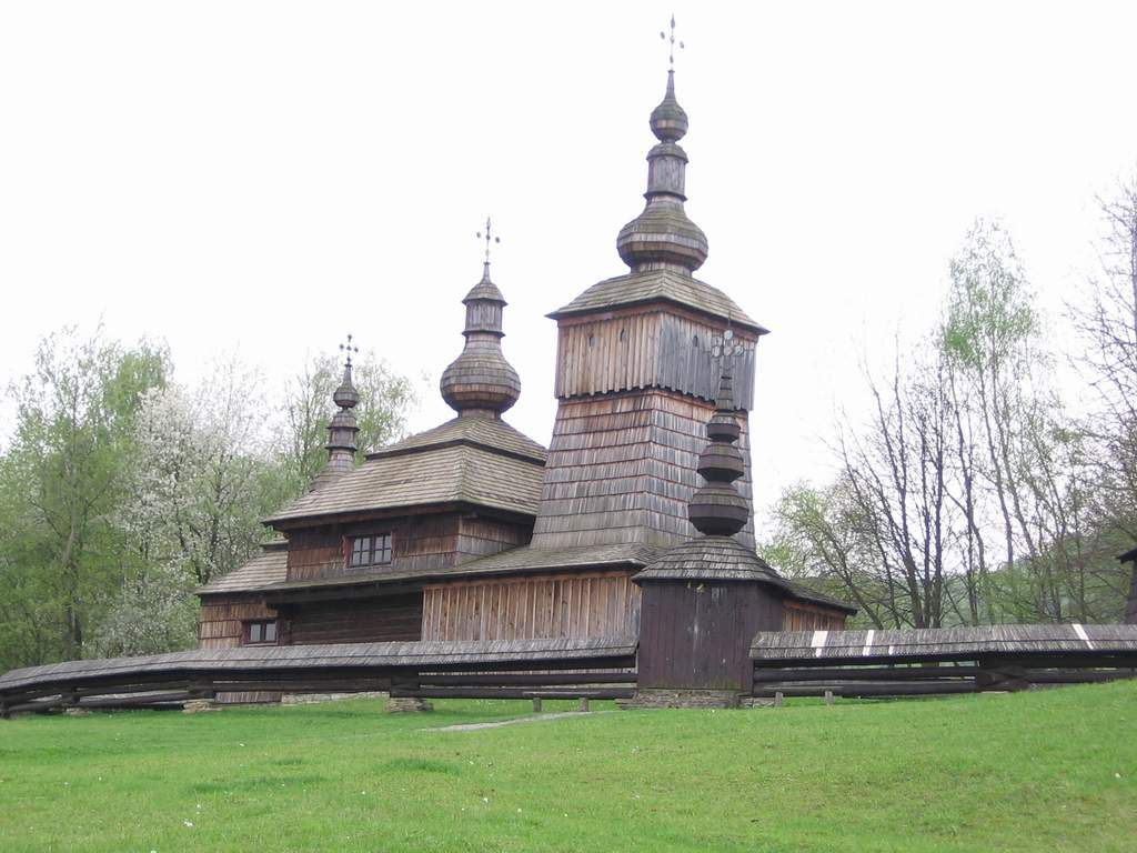 Small wooden Ruthenian church in Svidnik skansen.